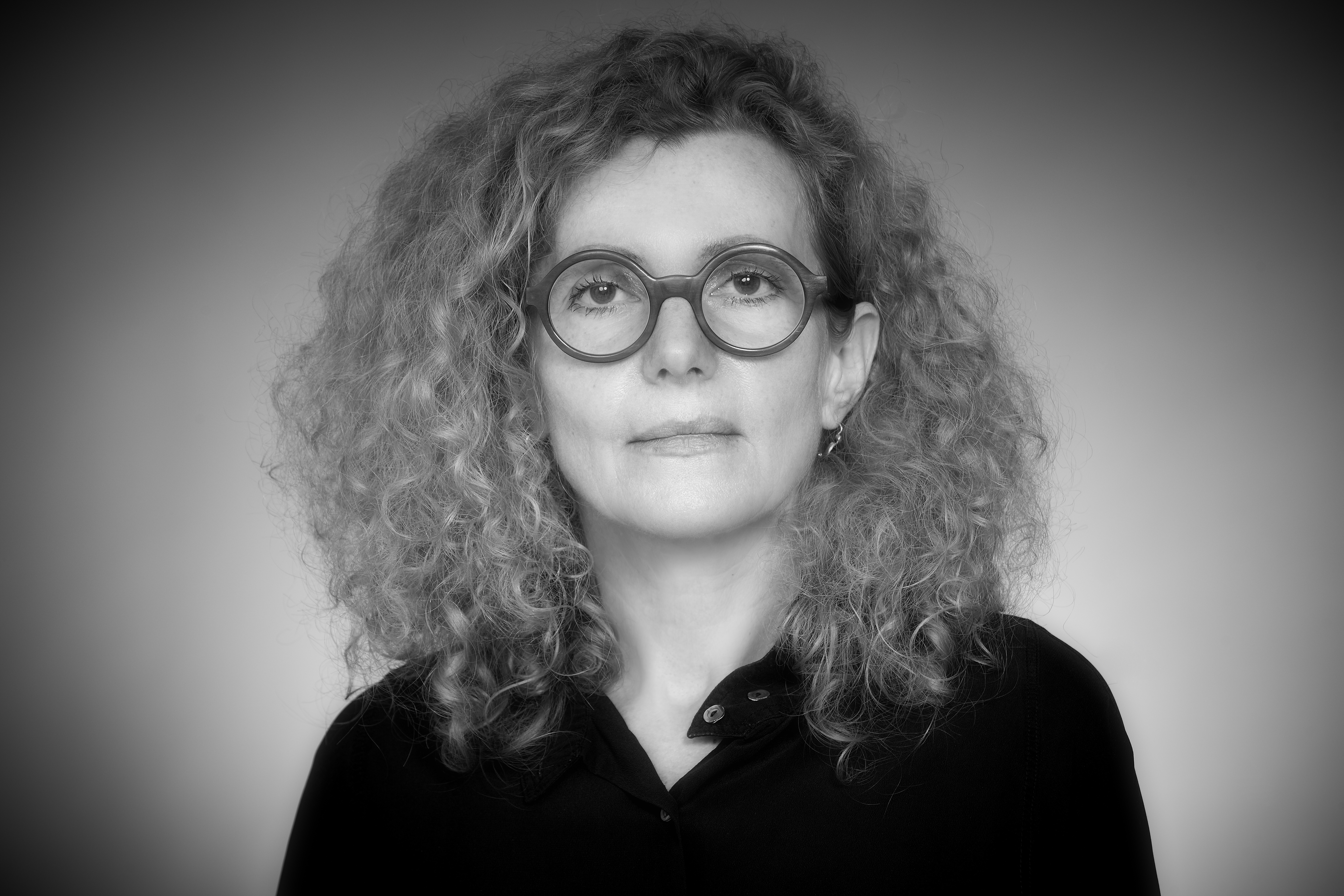 Elisabeth Plank (Foto: Ulli Engleder)